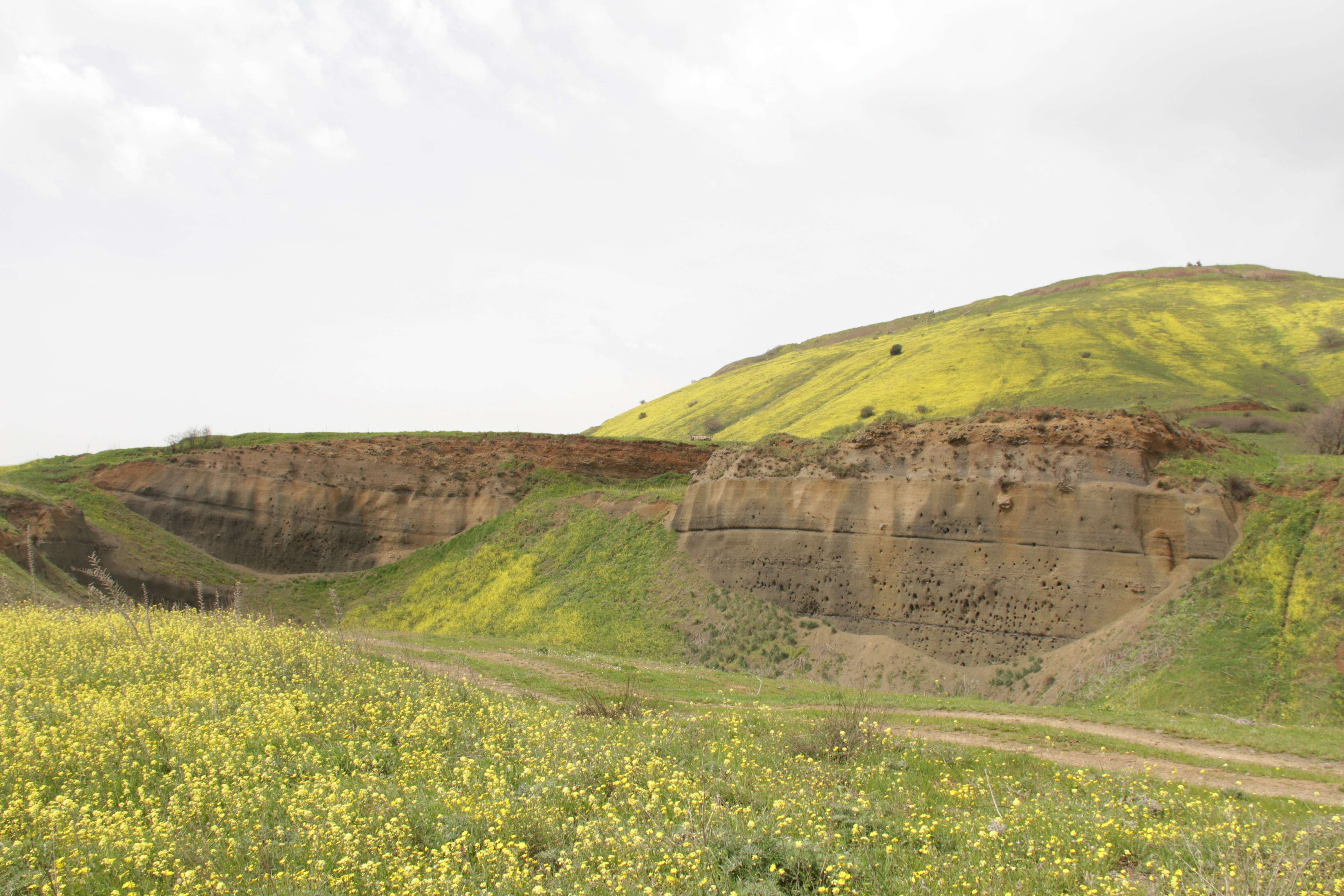 מחצבה ישנה של סקוריה דקת-גרגר בדרום הבנטל, רמת הגולן, ישראל